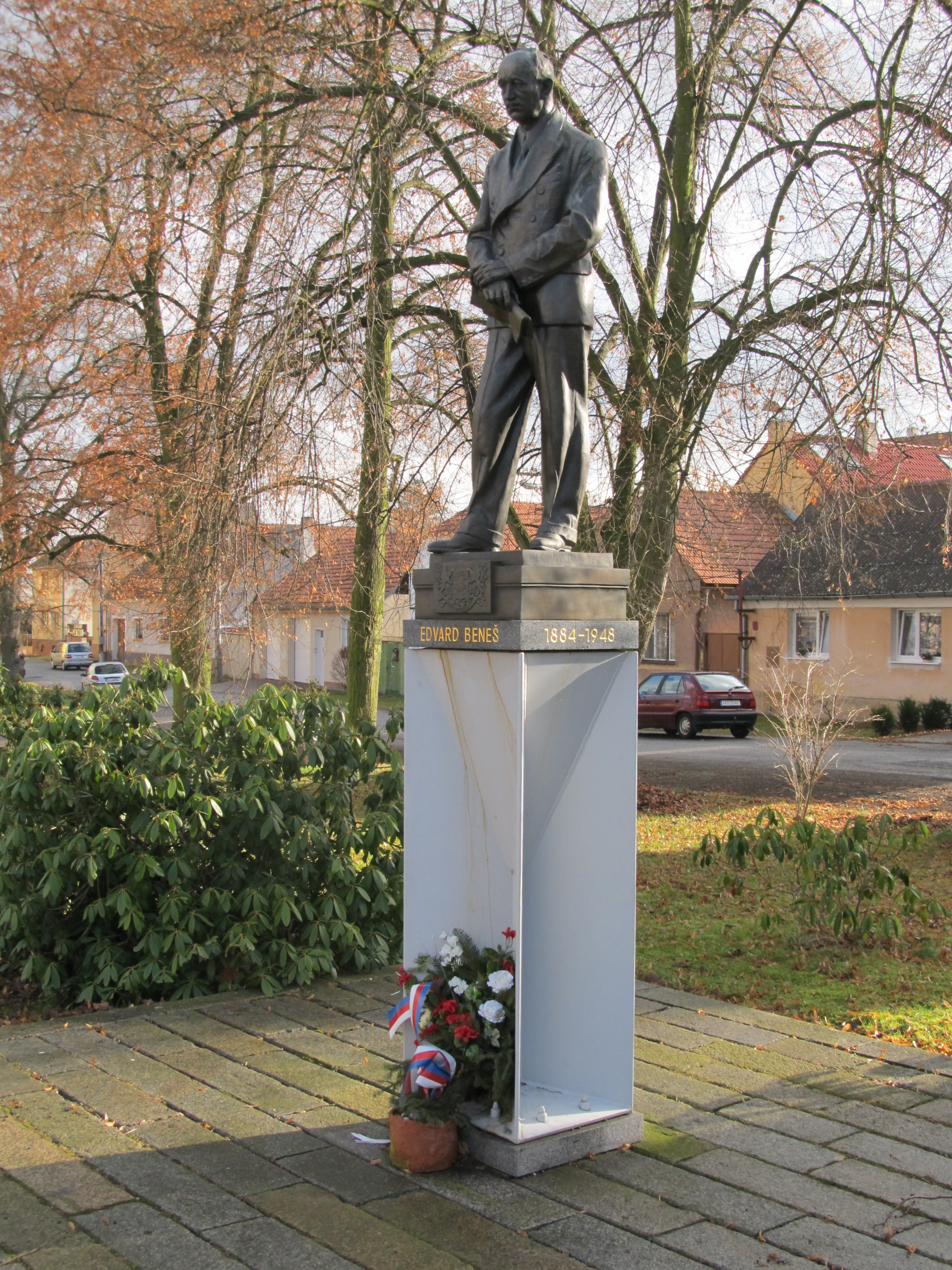 Kožlany - socha Edvarda Beneše